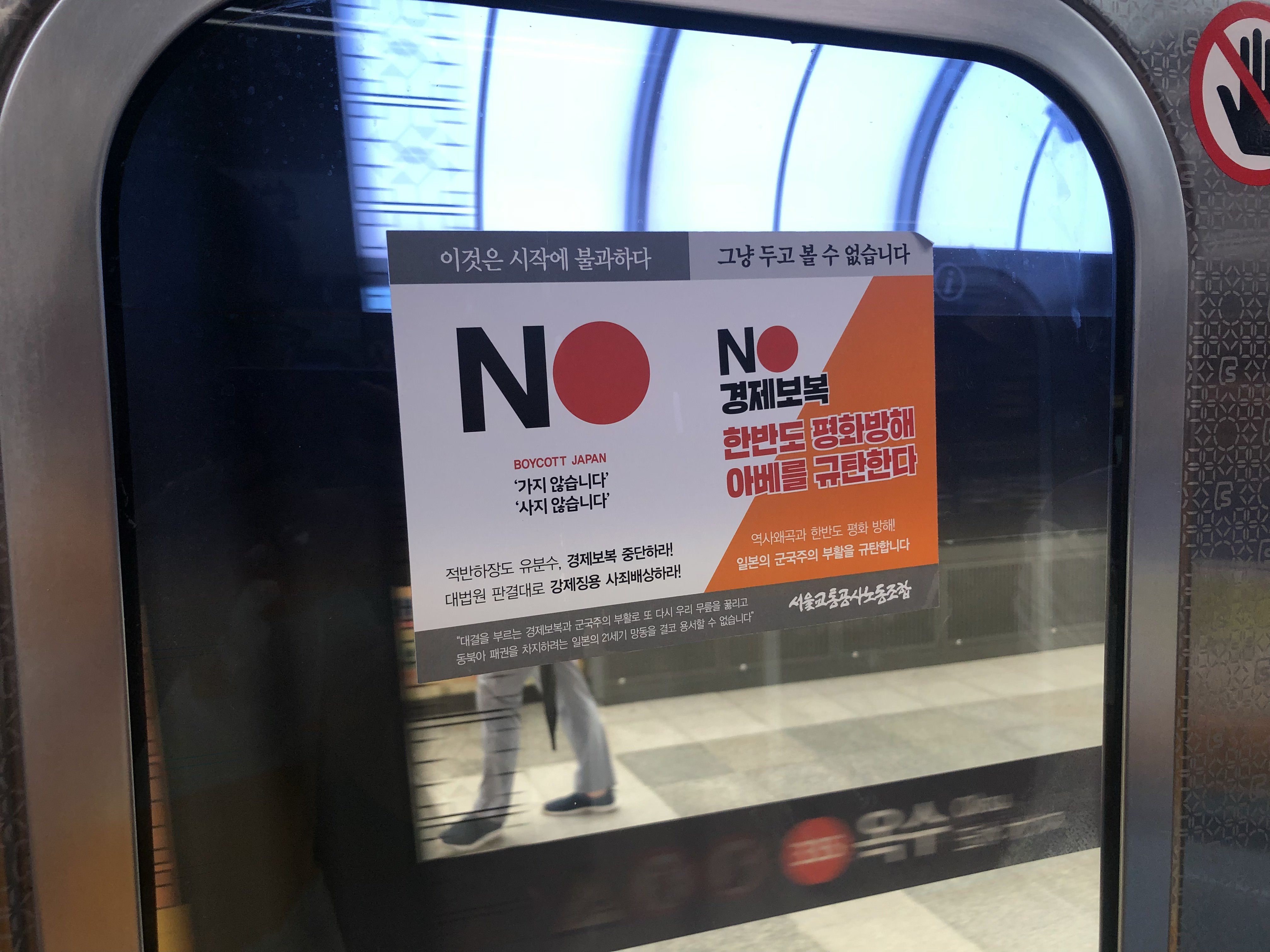 首尔京义中央线列车上抵制日本的标识